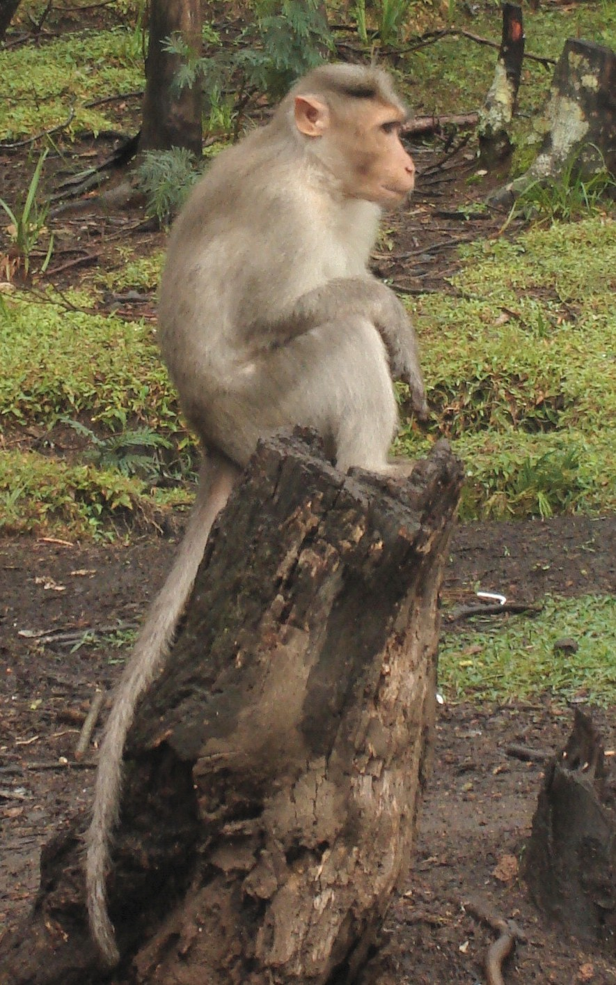 തൊപ്പിക്കുരങ്ങ്